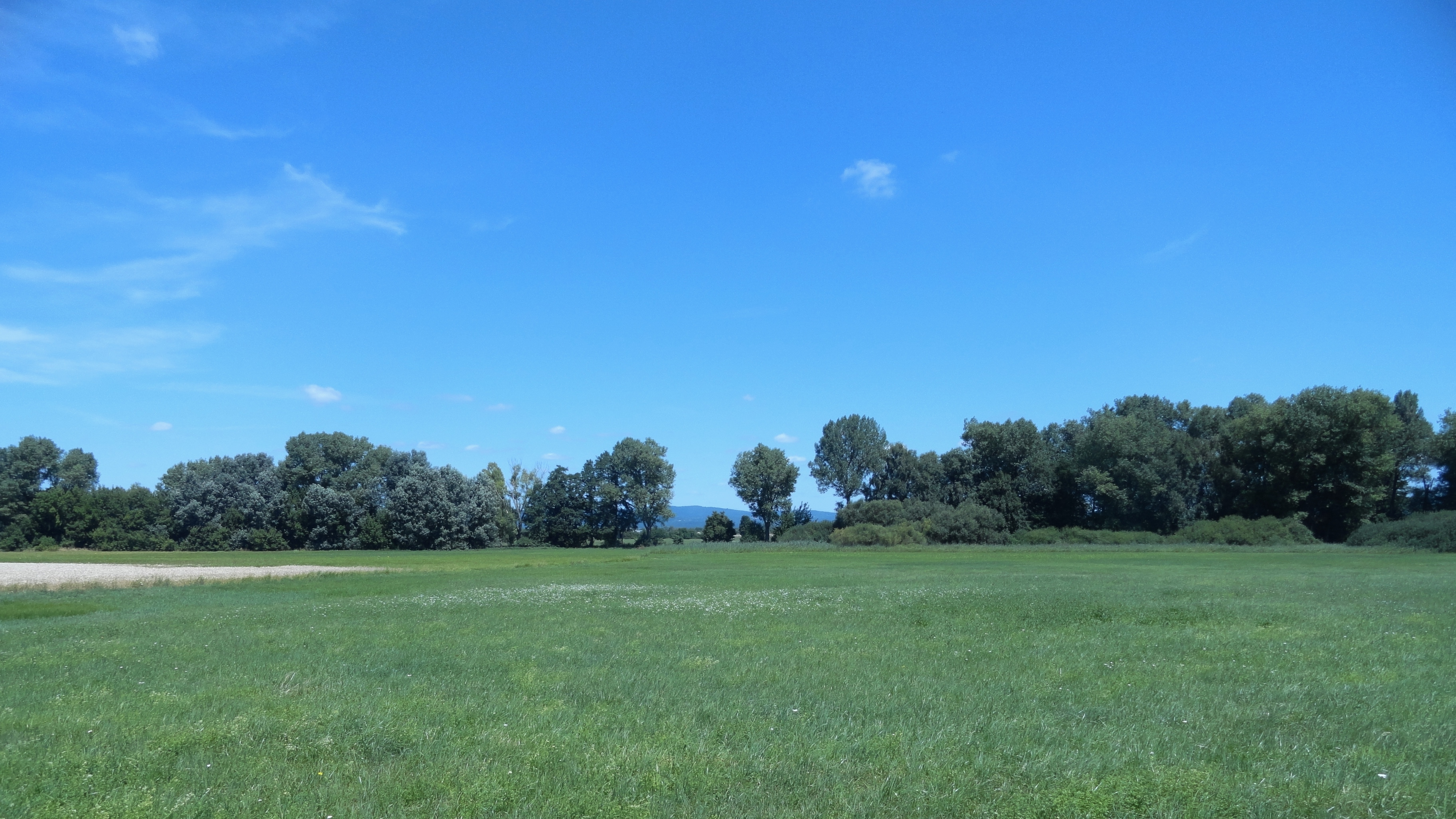 Landschaftsschutzgebiet Polder Straubing